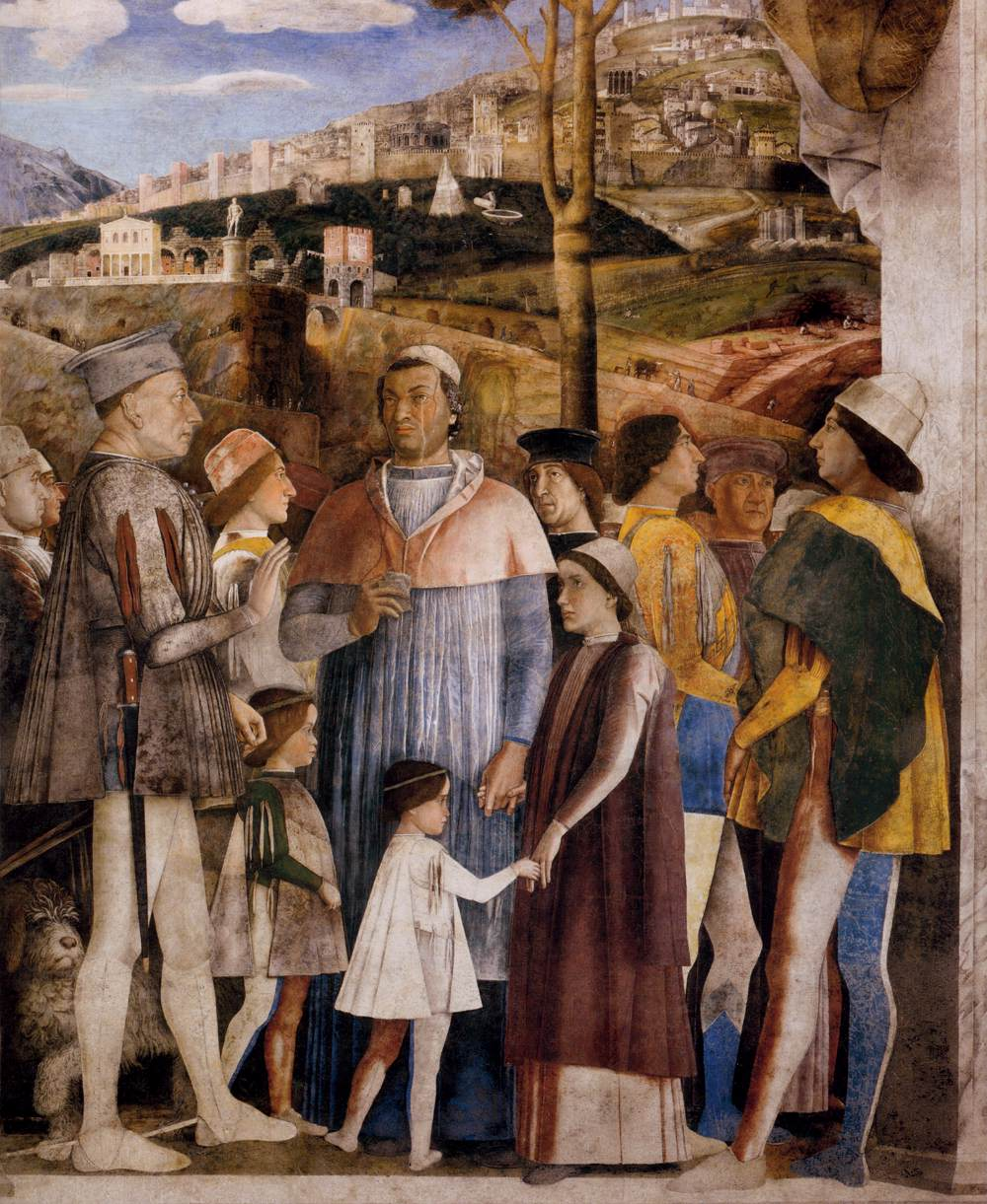 detail